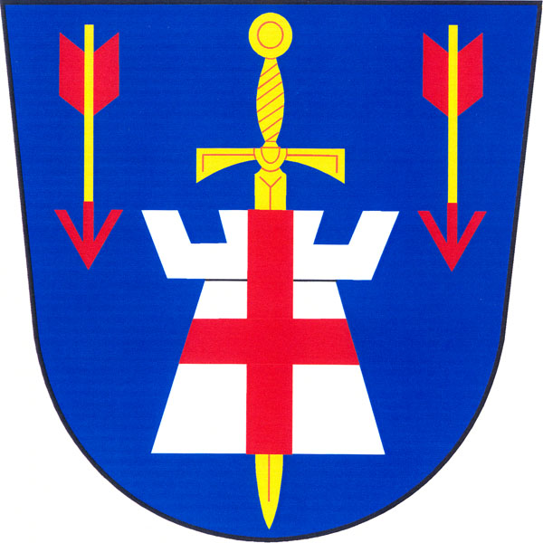 Znak obce Martínkovice